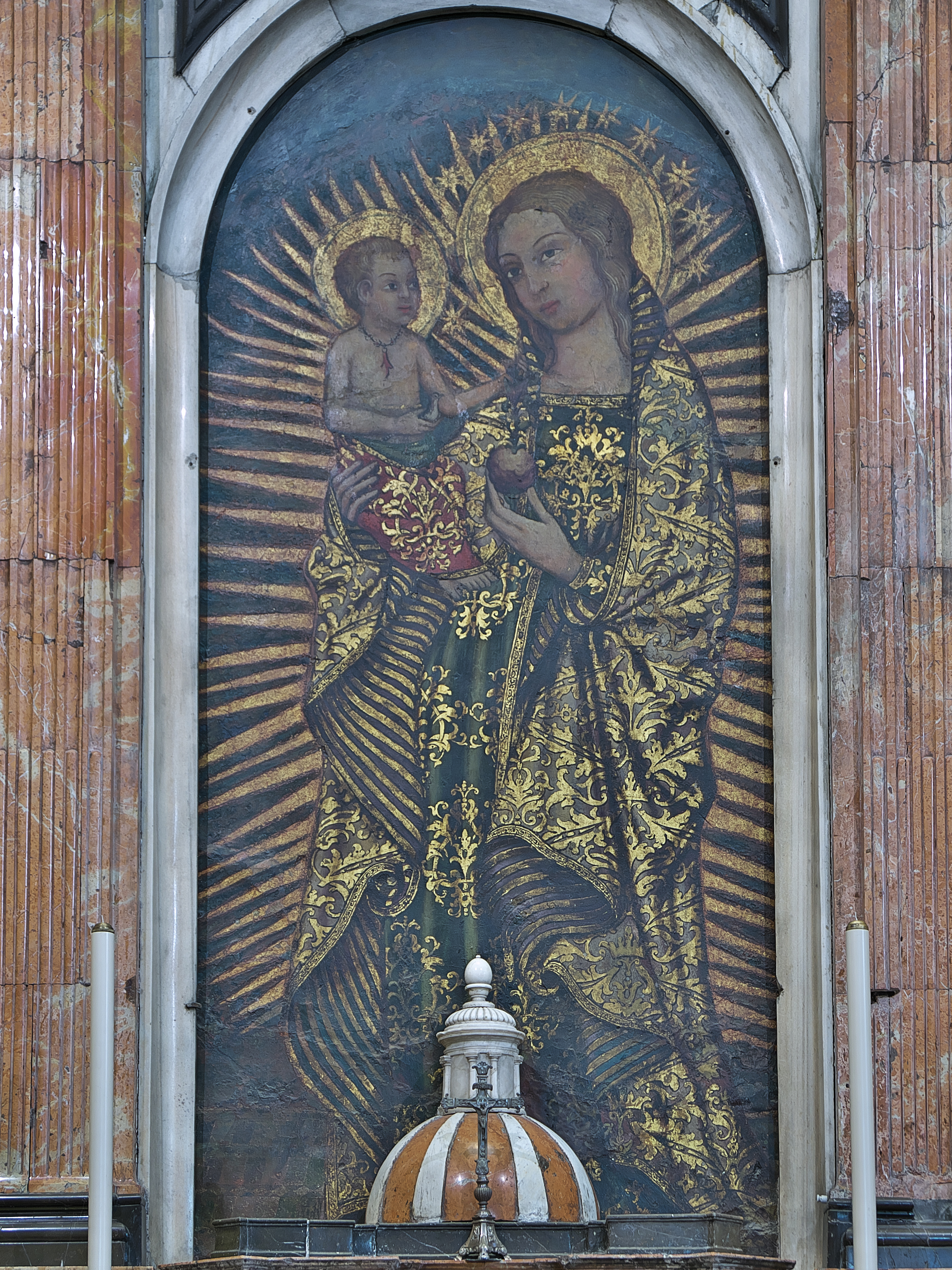 Iglesia de San Ildefonso (Sevilla). Junto con la pintura de la Santa María de Rocamador y la de la Virgen de la Antigua, son las pinturas murales mas antigua de la ciudad, segunda mitad del siglo XIV. Procede de la primitiva iglesia gótico-mudéjar de San Bartolomé, hoy de San Ildefonso. Repintada y restaurada en varias ocasiones, es atribuida, entre otras hipótesis, a Juan Sánchez de San Román, pintor atraido por el mejor cliente del momento: la fábrica de la Catedral de Sevilla.